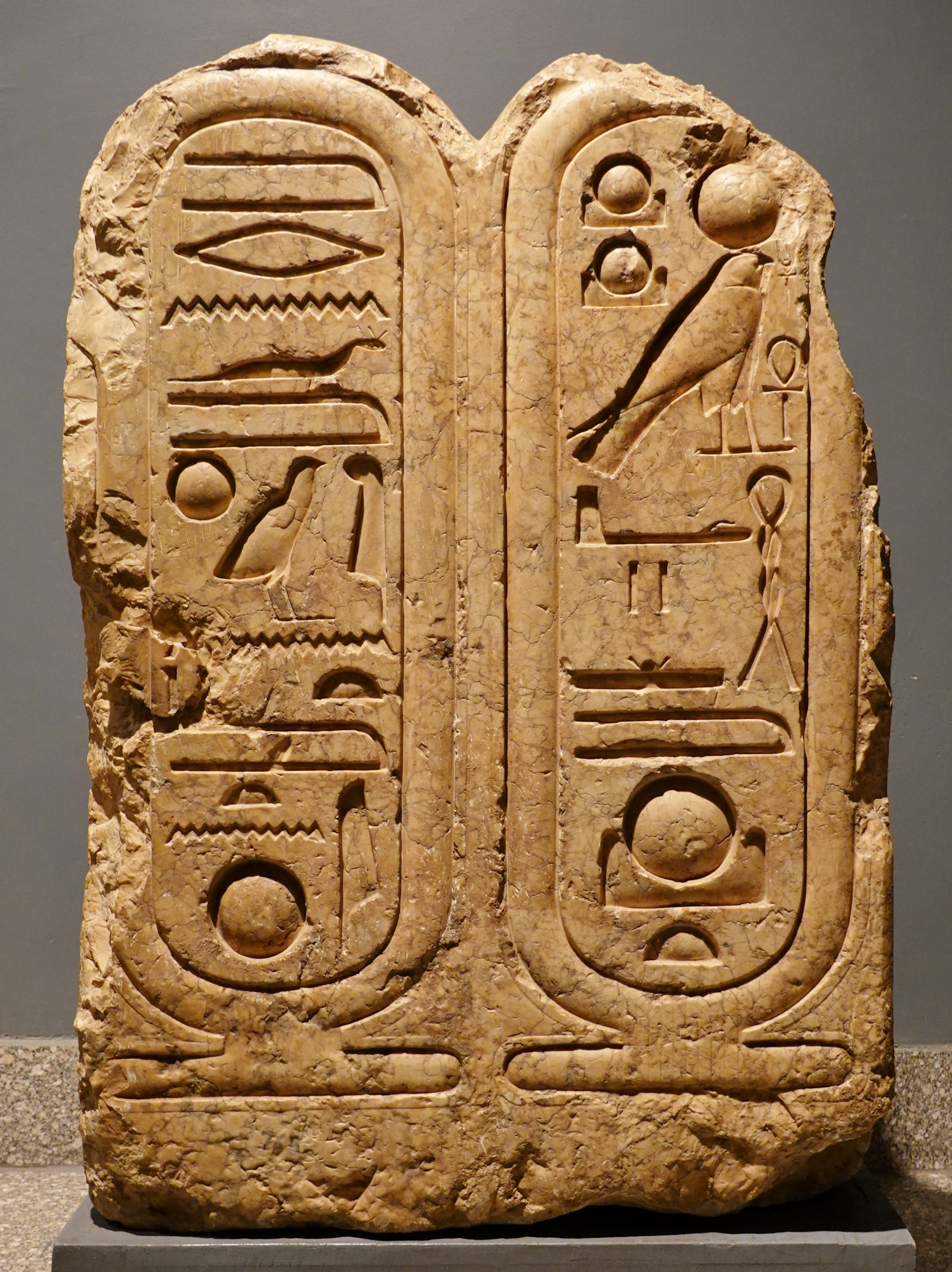 Relief mit den Kartuschen des Königs Echnaton (Kalkstein, 18. Dynastie), gefunden in Karnak, ausgestellt im Luxor-Museum, Ägypten